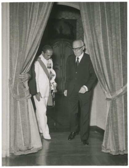 Il presidente della Camera dei Deputati Alessandro Pertini riceve il Capo di Stato Maggiore della Difesa Ammiraglio Eugenio Henke